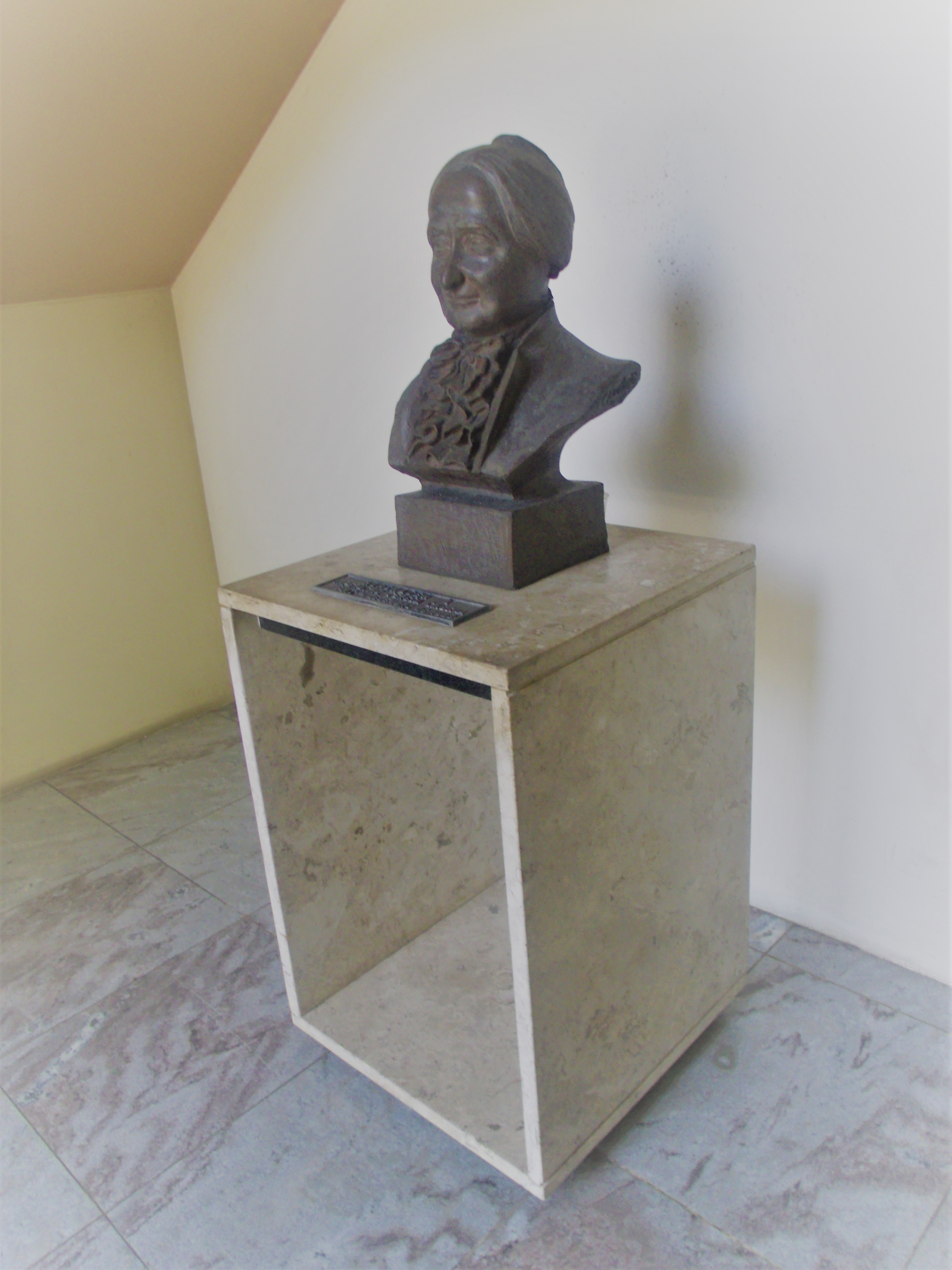 Busto da Imperatriz, Thereza Crsitina, no Palácio da Cidade de Teresina.